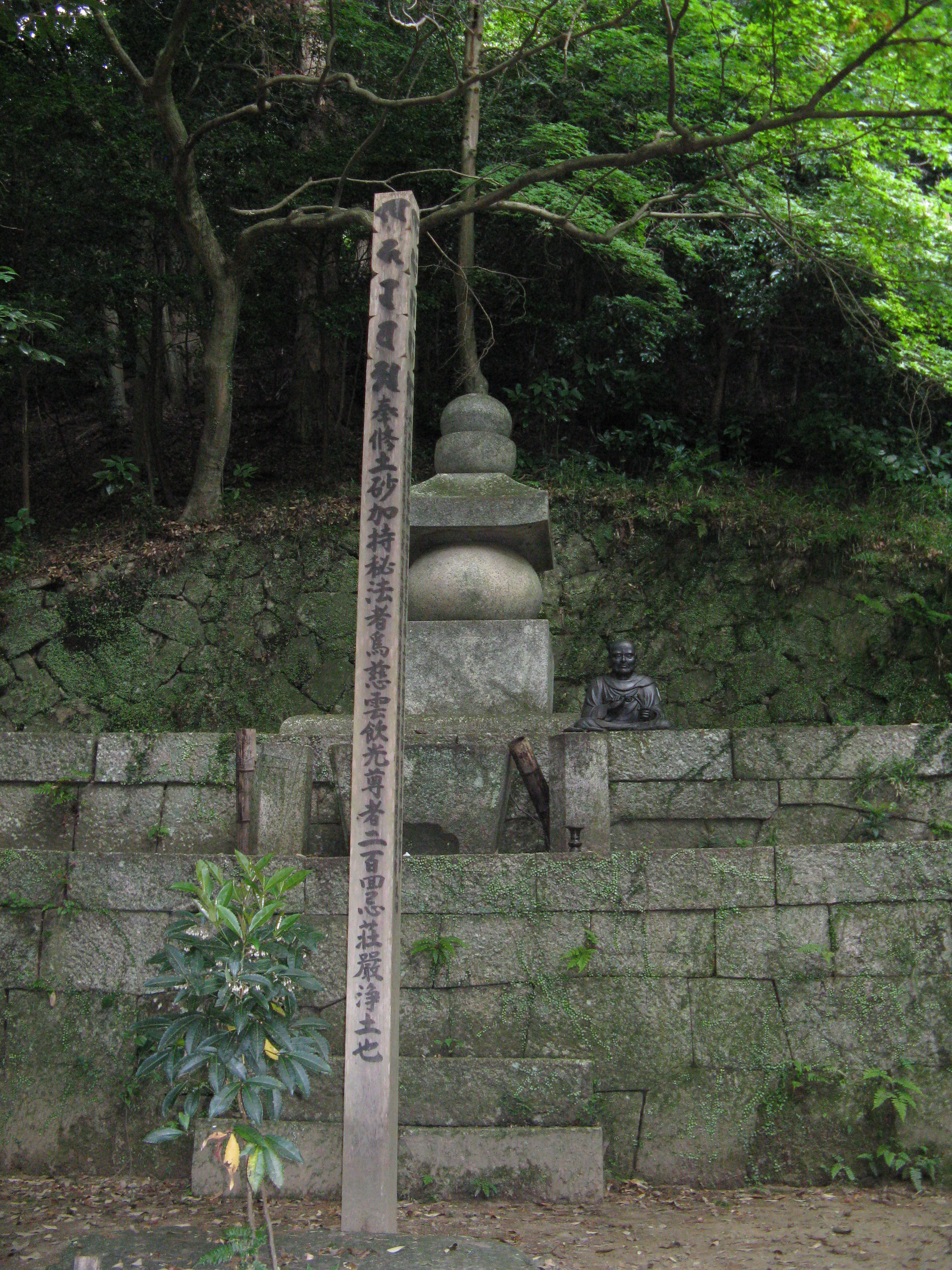 高貴寺 慈雲尊者霊廟